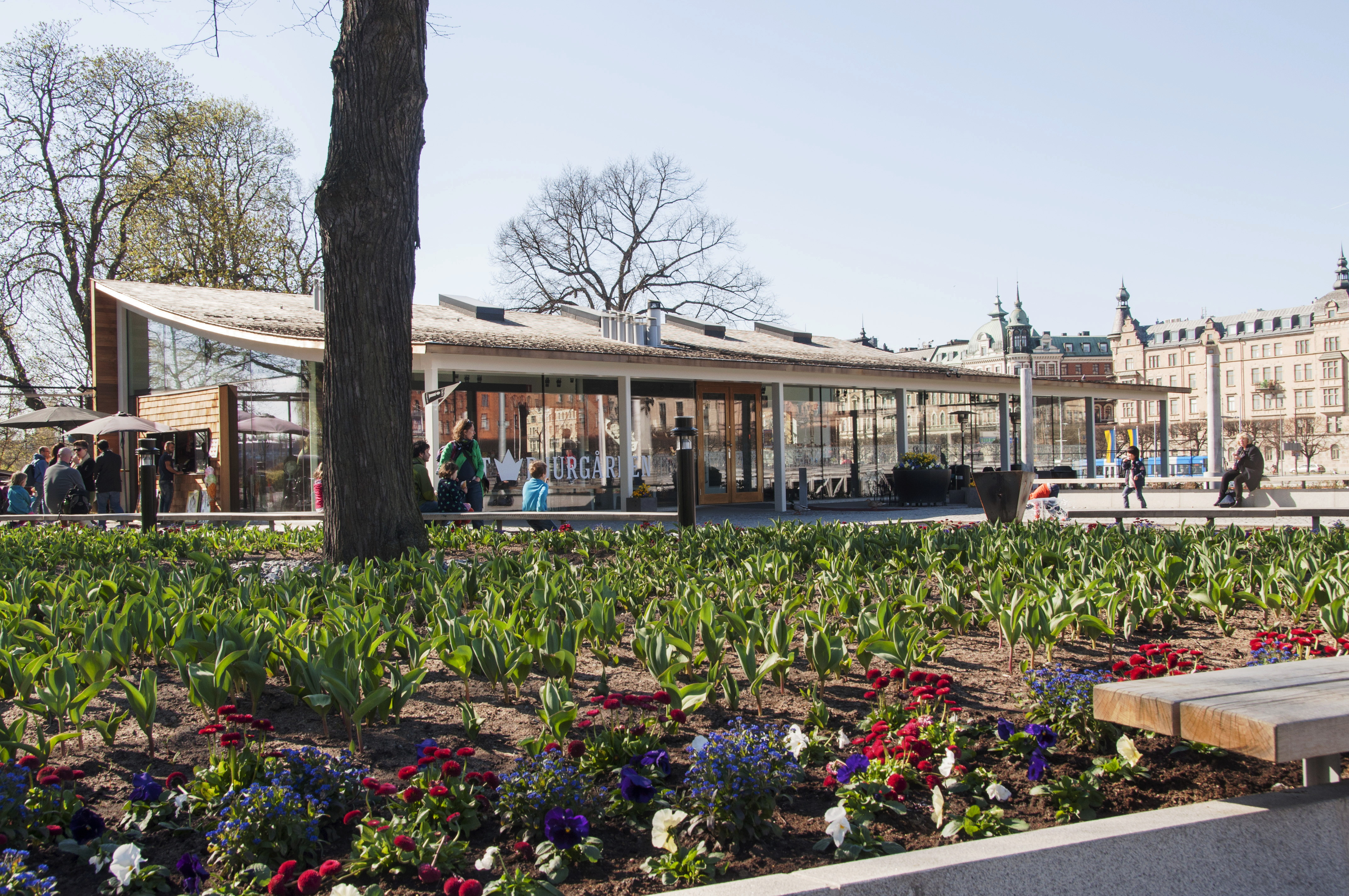 Djurgårdens besökscentrum med Djurgårdsbrons Sjökafé. Nybyggnadsår 2013. Arkitekter: Ettelva arkitekter